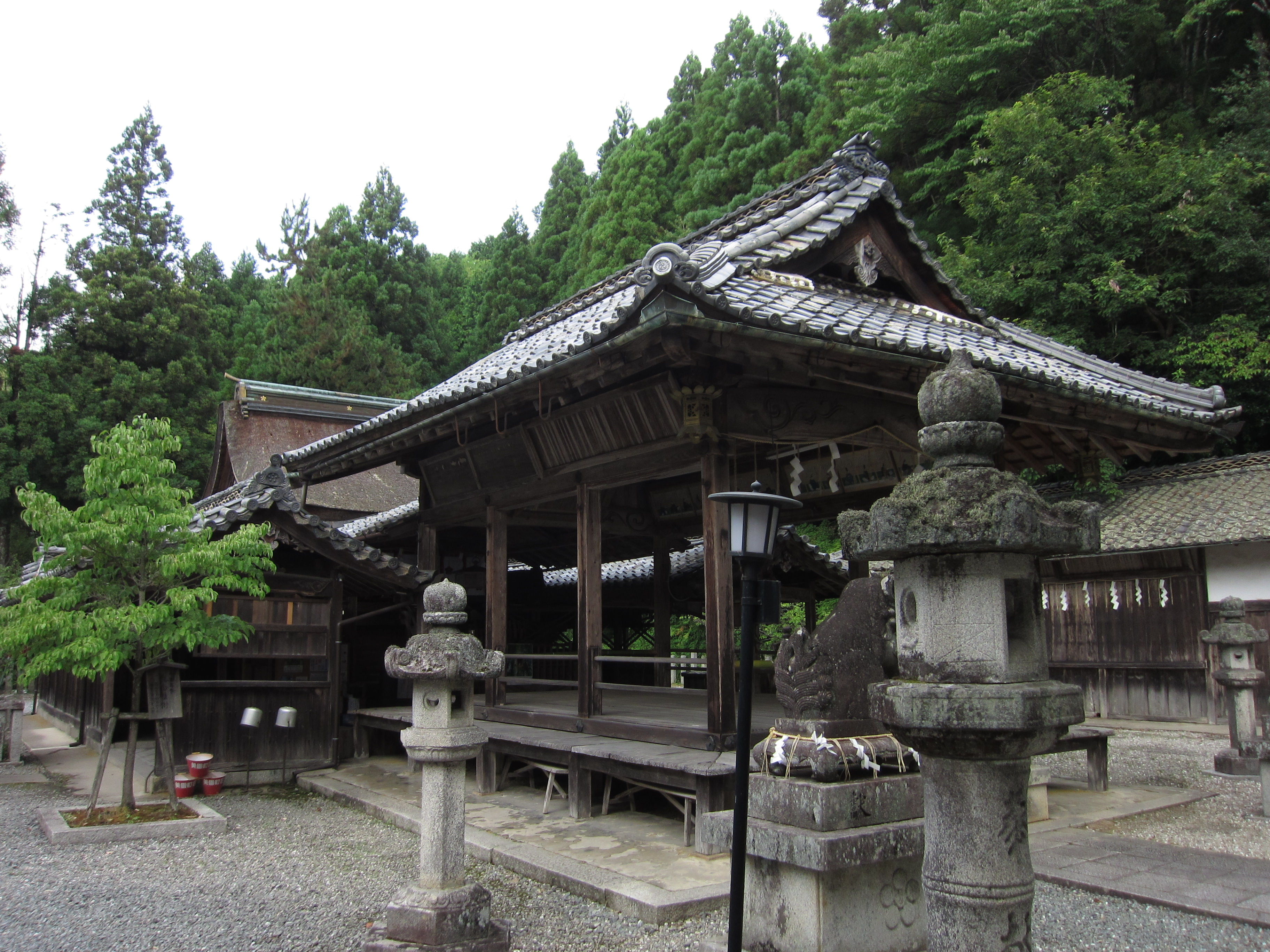 生身天満宮 境内